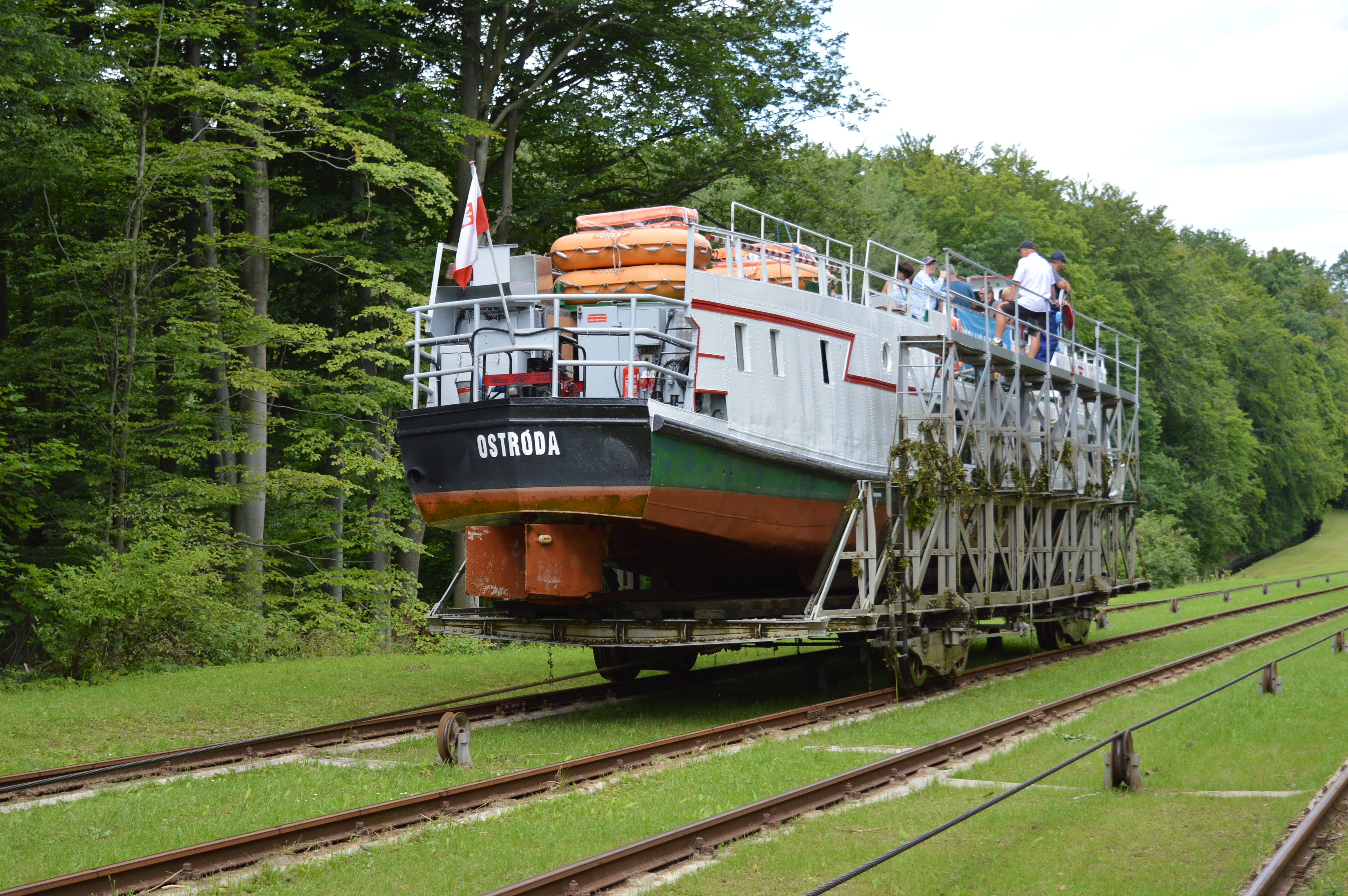 Pochylnia Buczyniec w zespole Kanału Elbląskiego Wikidata has entry Q5637 with data related to this item.